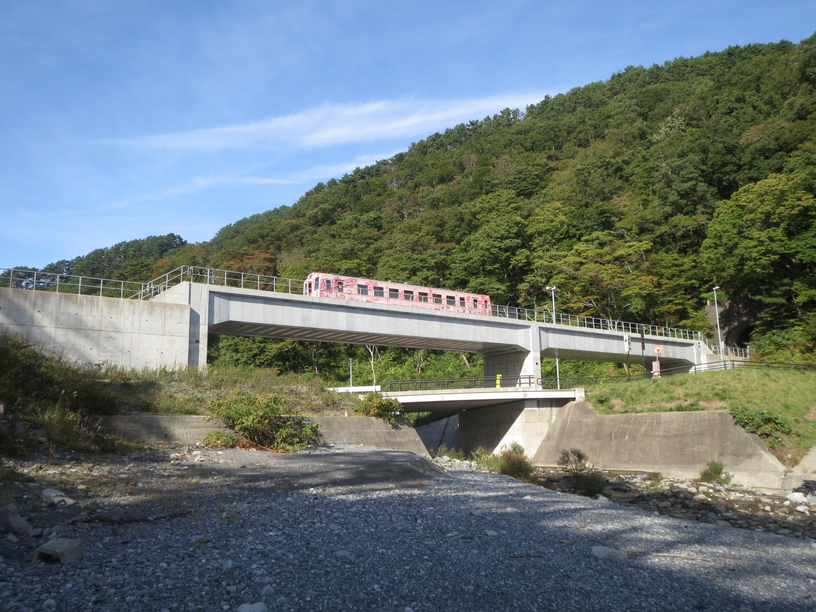 田野畑村にあるハイペ沢橋梁